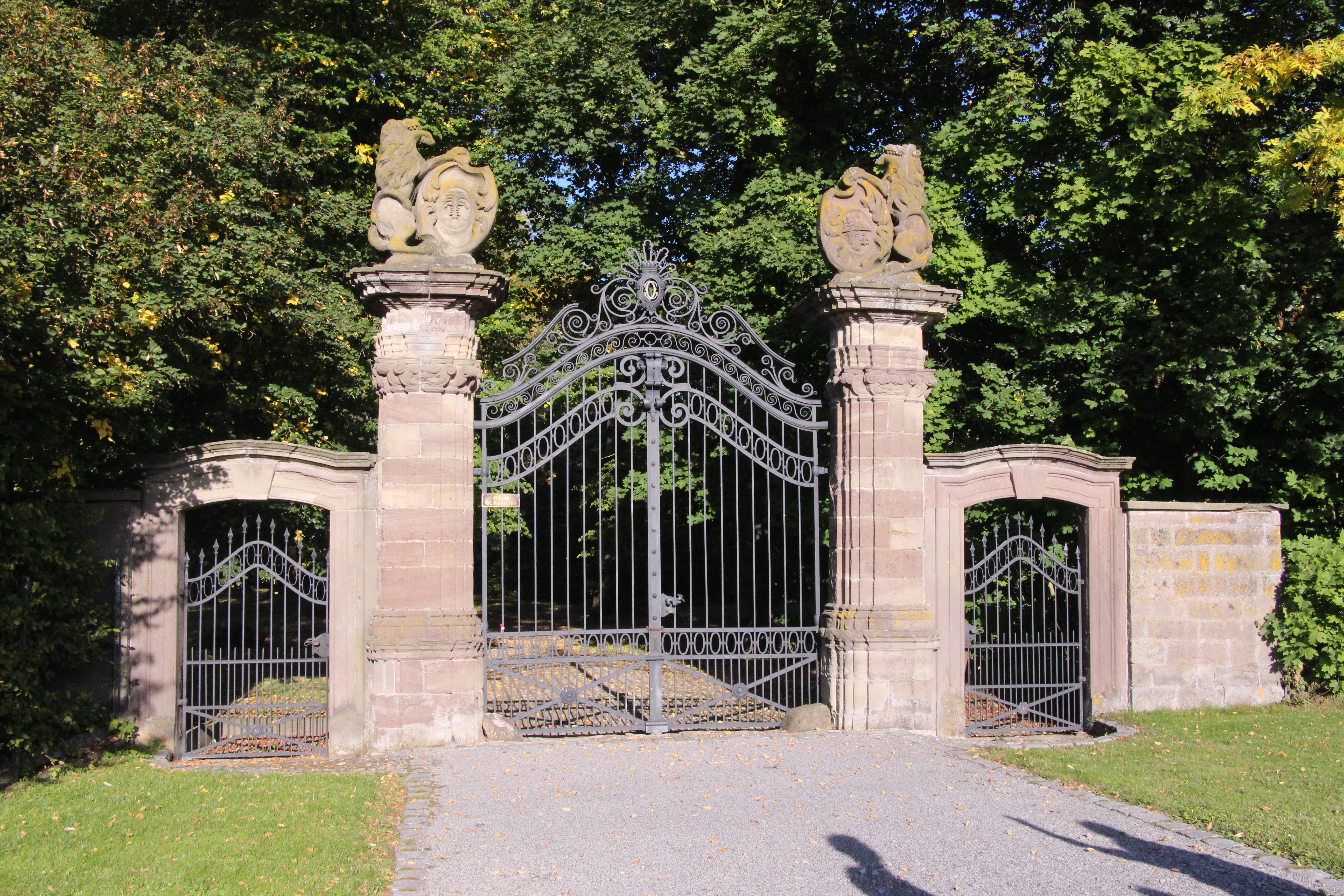 Wappen der Schlossbesitzer Georg von Grunelius (links) und Berta von der Heyder (rechts) am Schlosstor in Oberlauringen